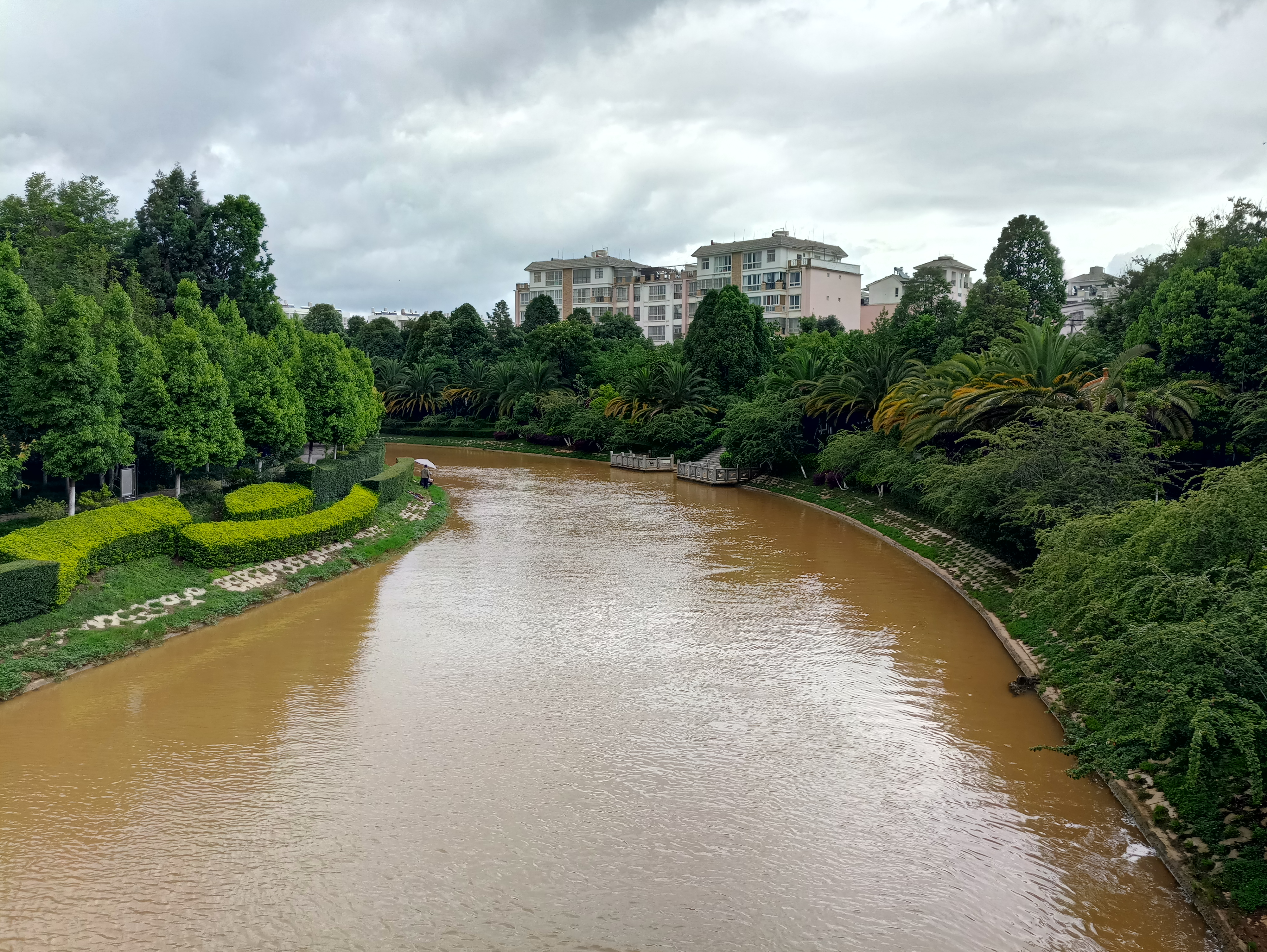 中文（中国大陆）: 石林县城的巴江河段